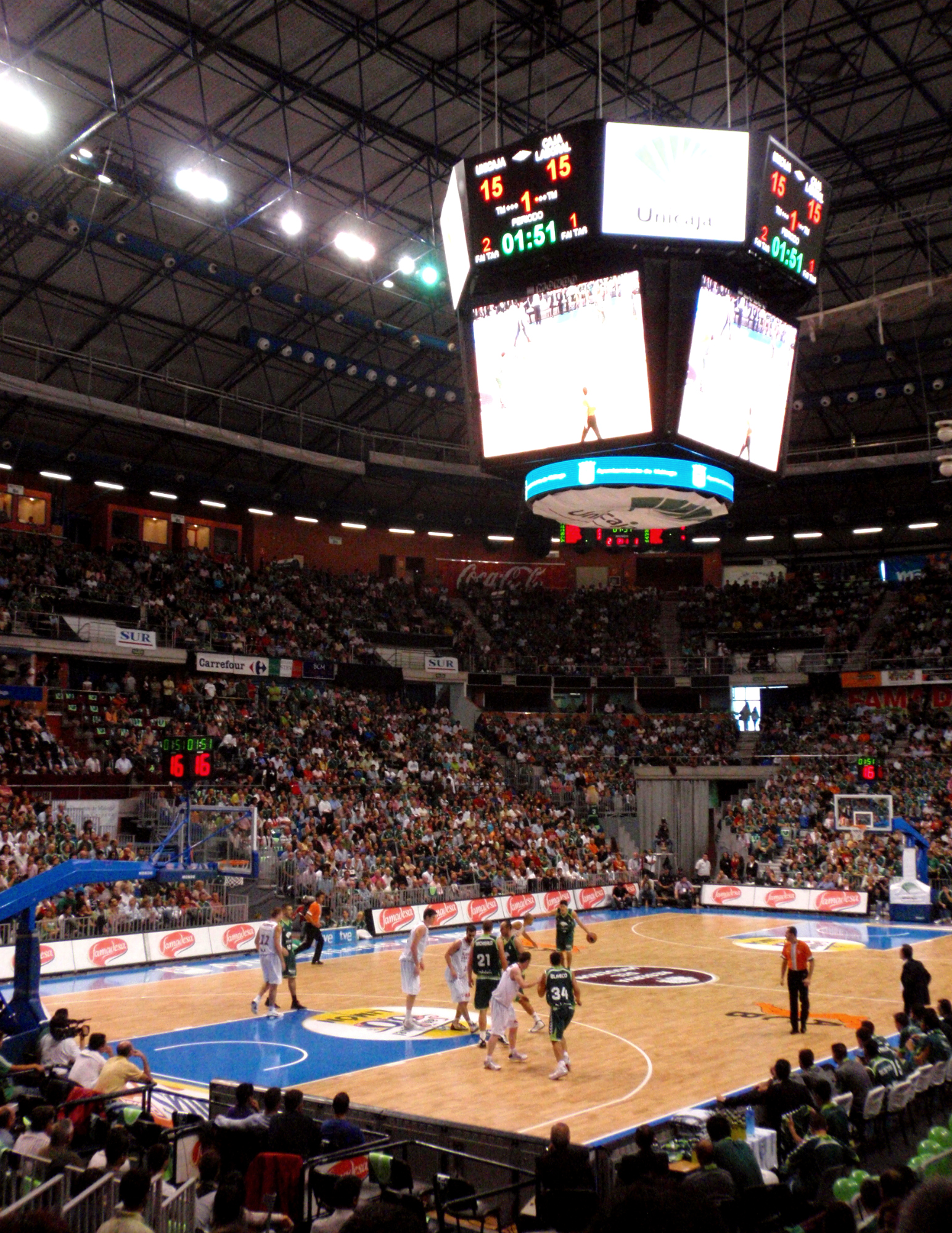 Martín Carpena interior